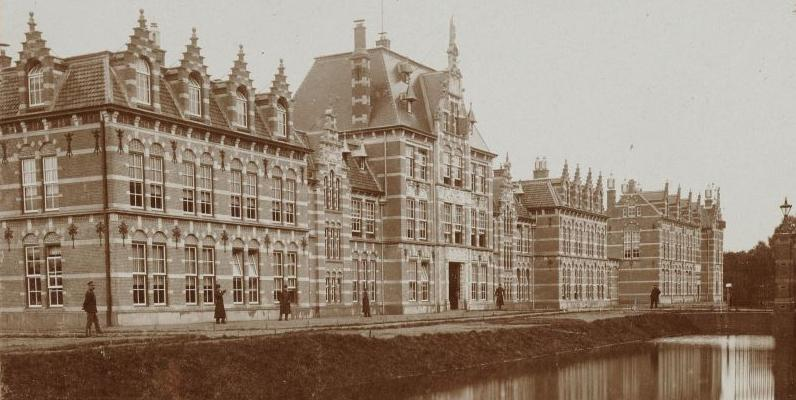 Cadettenschool in Alkmaar (rond 1893)